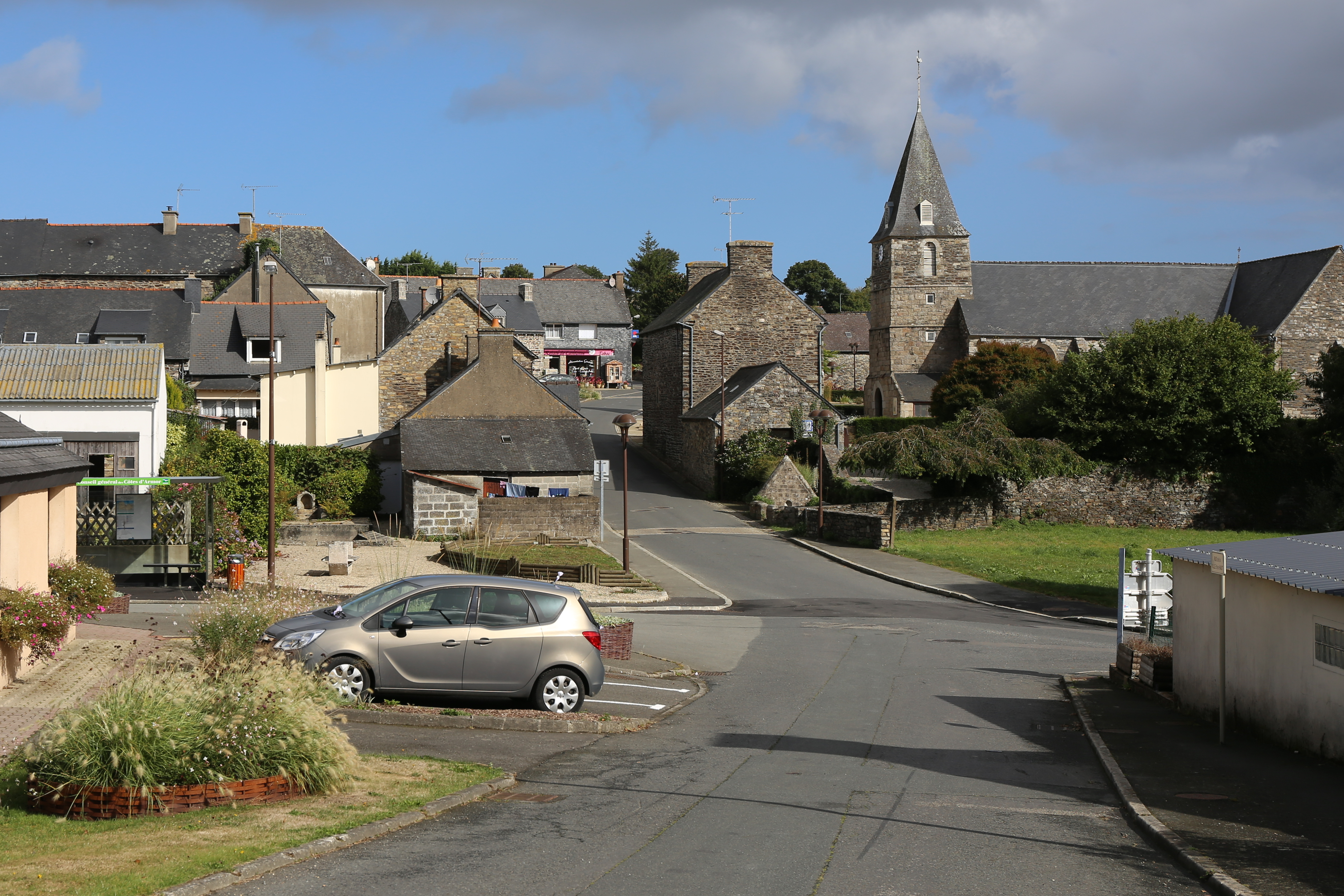 Kreiz-kêr Lanfeun.